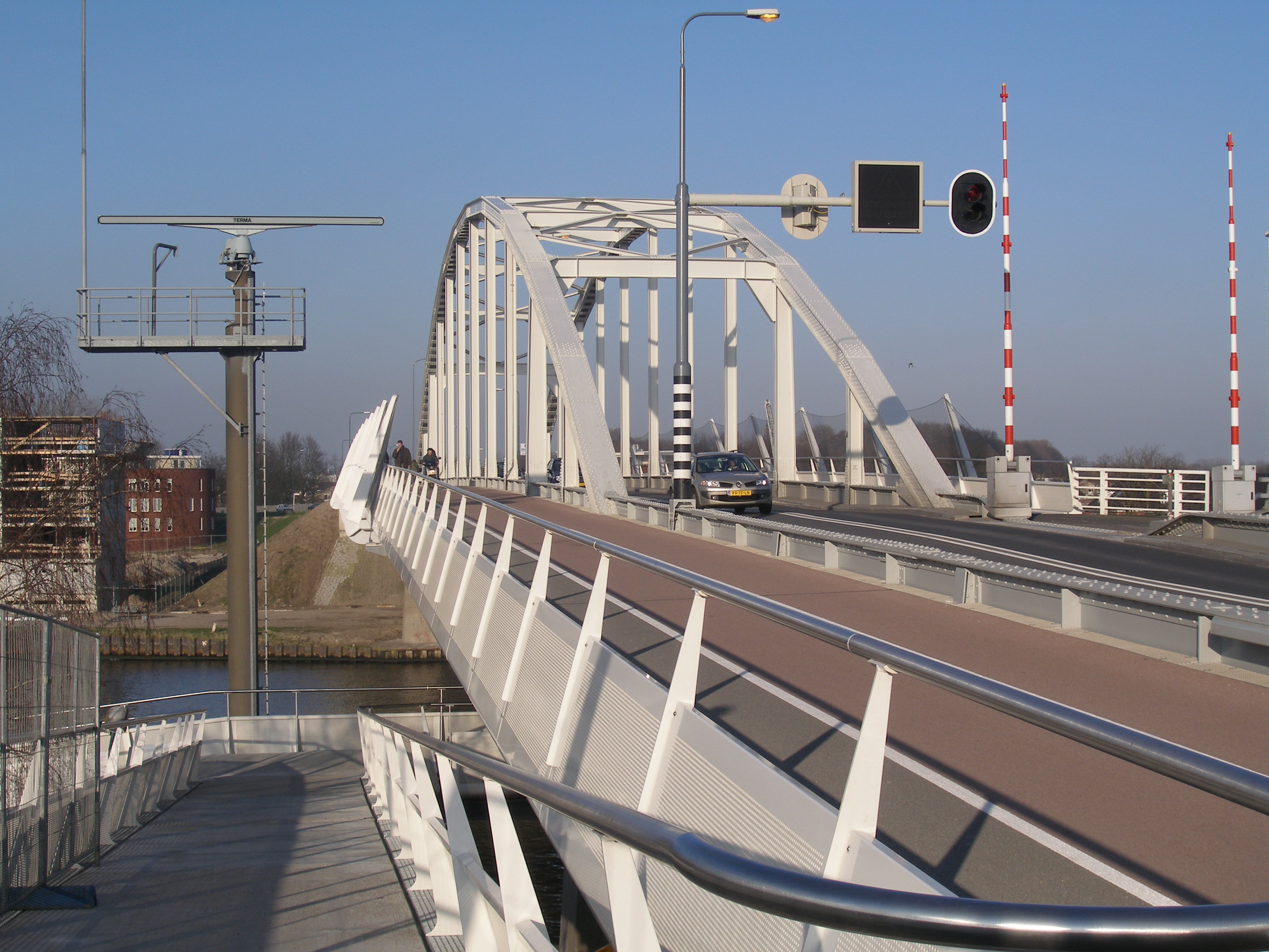 Maarsserbrug, 11-03-2007, japiot